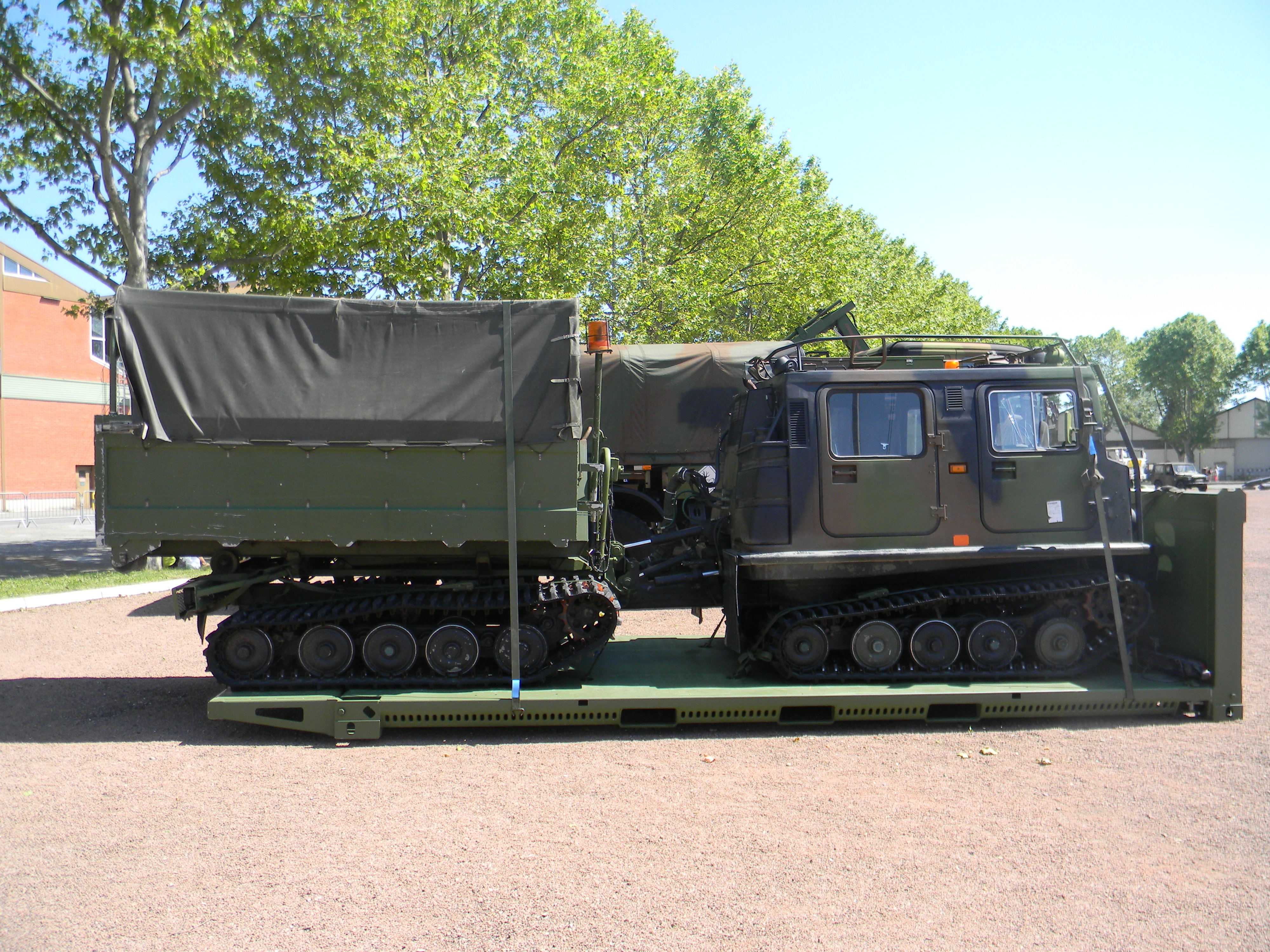 Journées portes ouvertes du quartier général Sabatier à Lyon le 15 et 16 juin 2013.